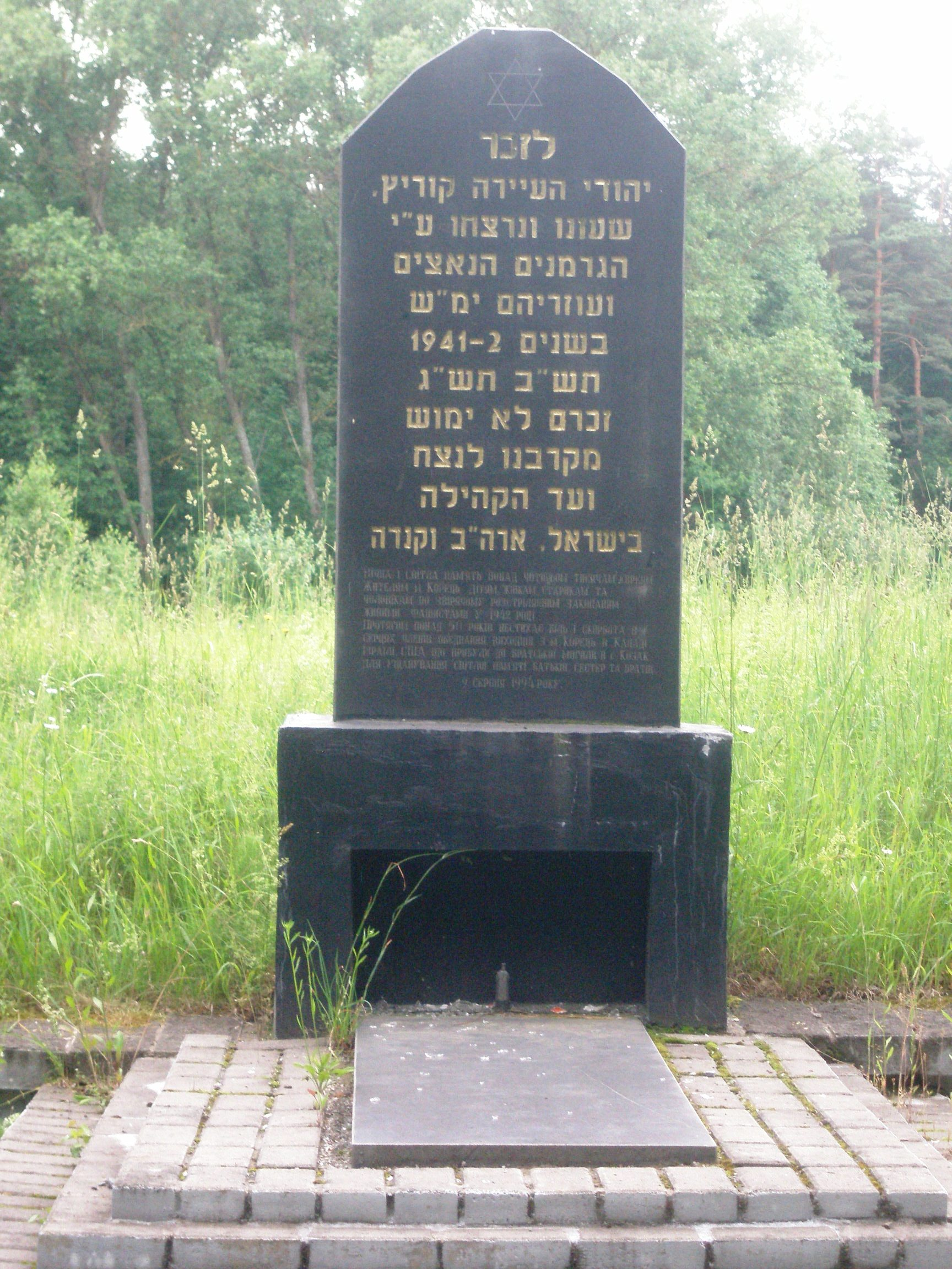 с. Козак, Корецький район. Пам'ятний знак розстріляним євреям.